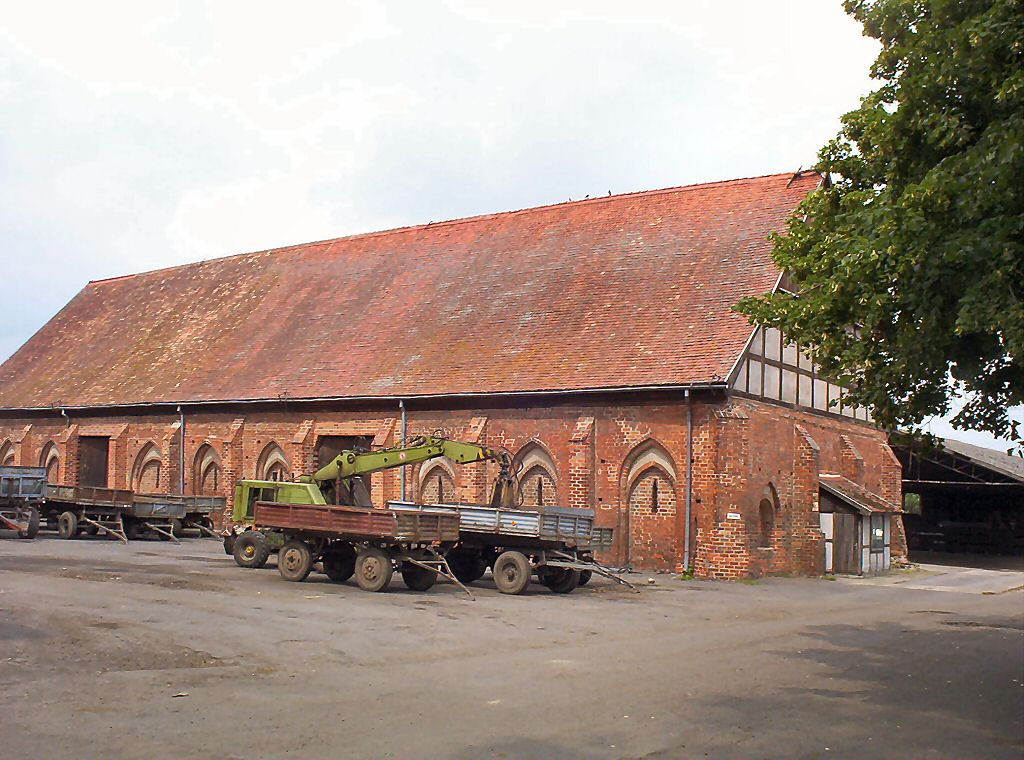 Kołbacz - stodoła gotycka w dawnym majątku cysterskim